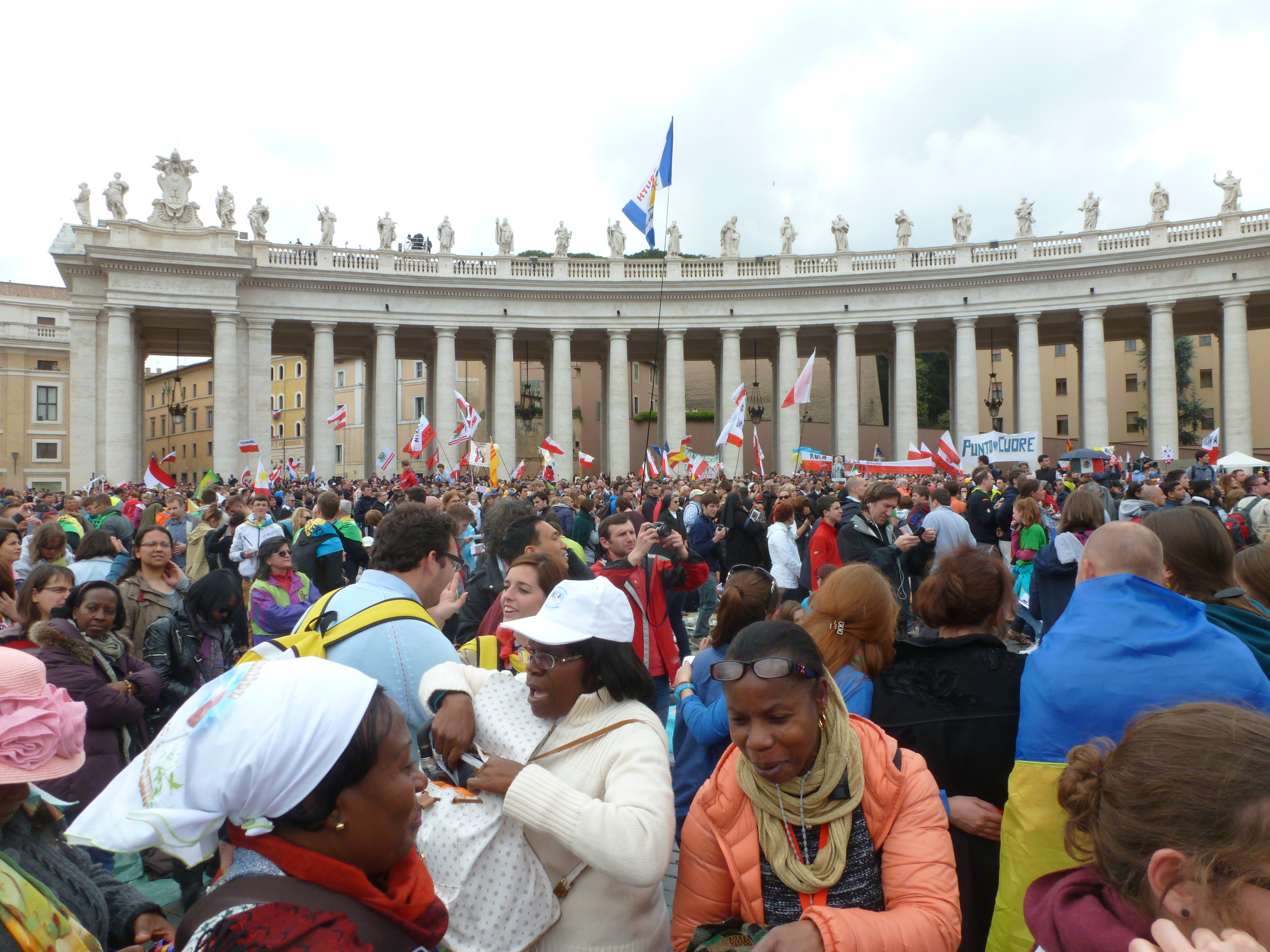 Pèlerins place Saint-Pierre pour la canonisation de Jean XXIII et Jean-Paul II.